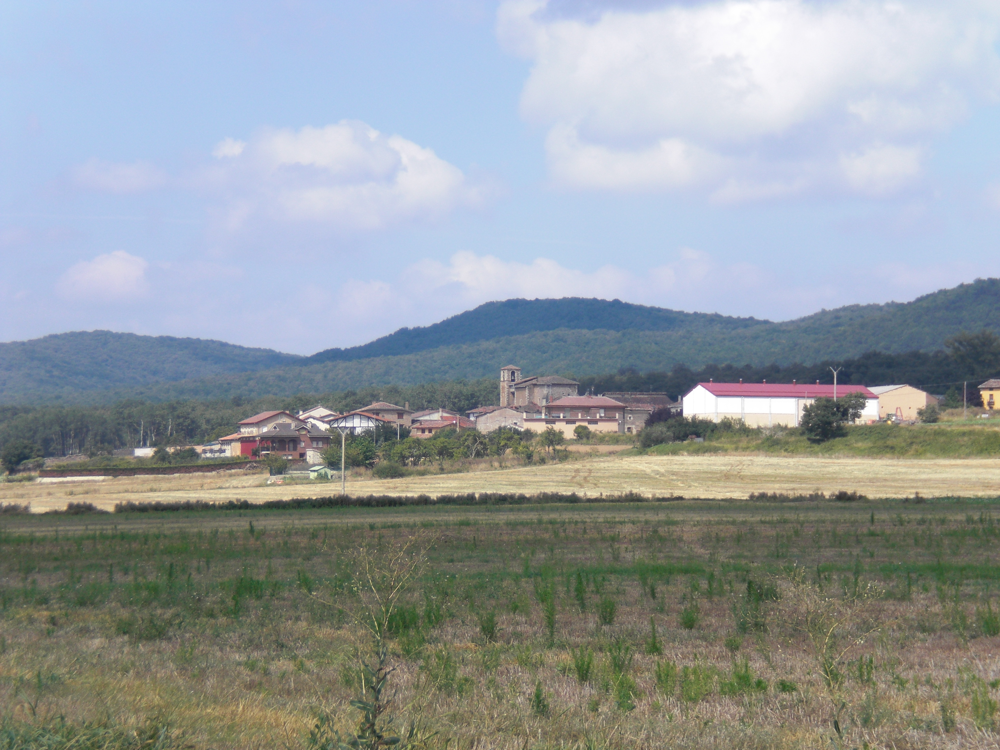 Bernedoko Nafarrate herriaren ikuspegia